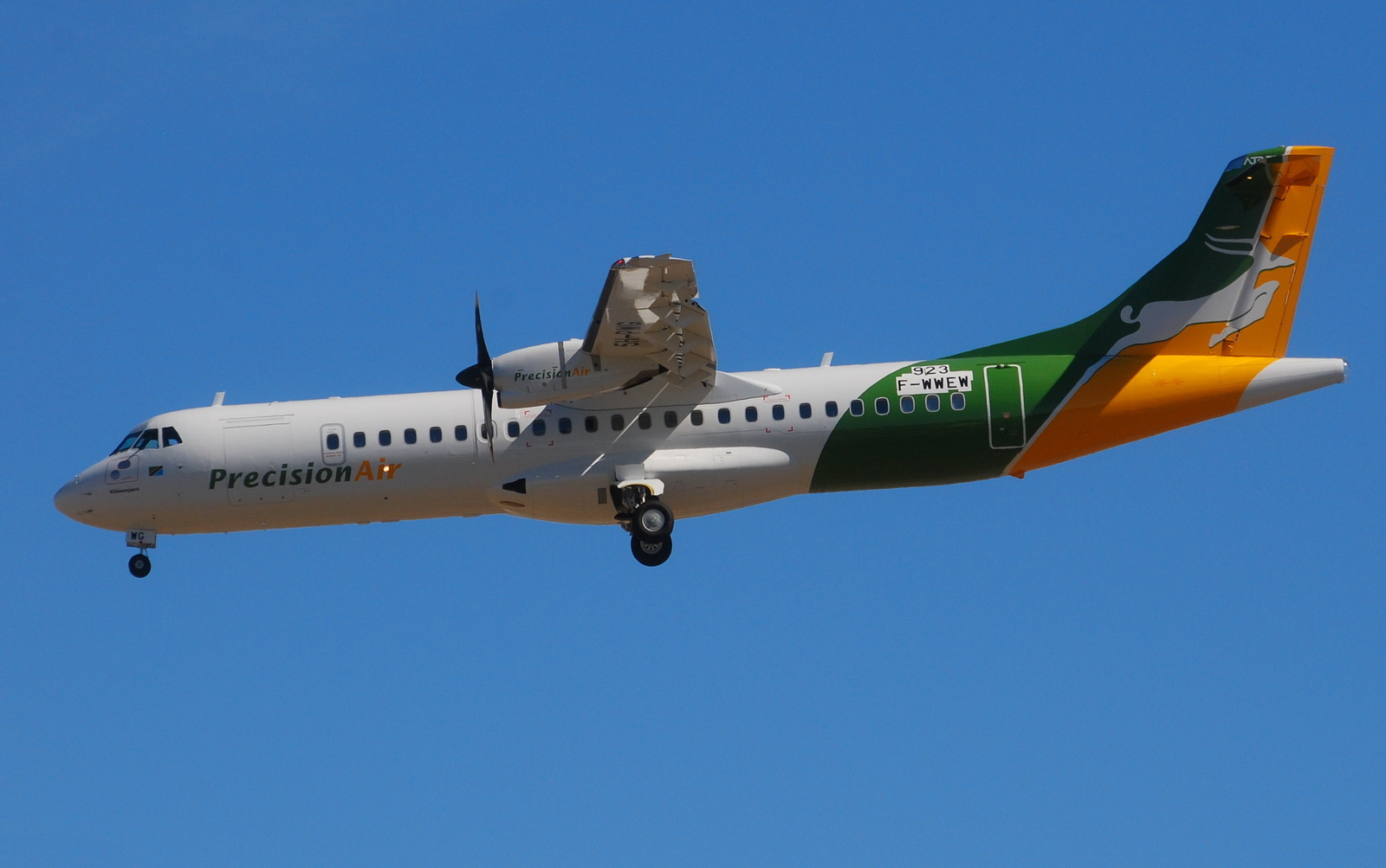 Photo prise à l'aéroport de Toulouse-Blagnac (LFBO) en France. Picture take at Toulouse-Blagnac Airport (LFBO) in France.